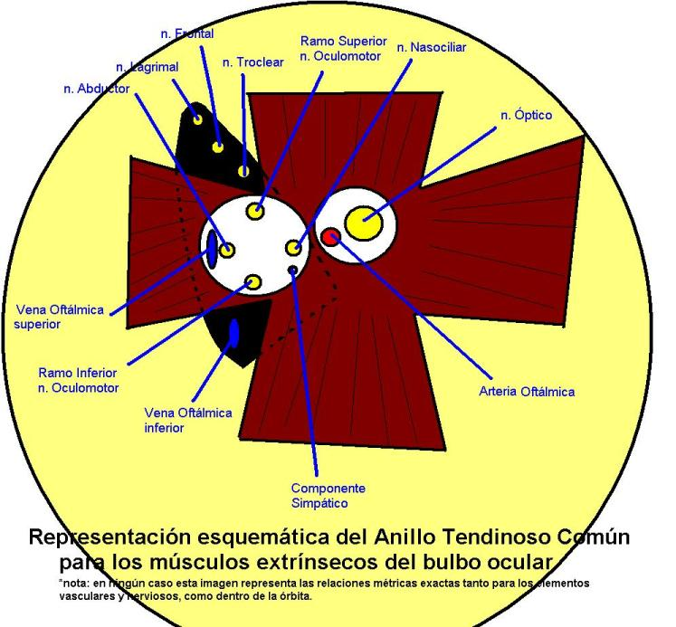 Esquema Anillo Tendinoso Común para los músculos extrínsecos del bulbo ocular